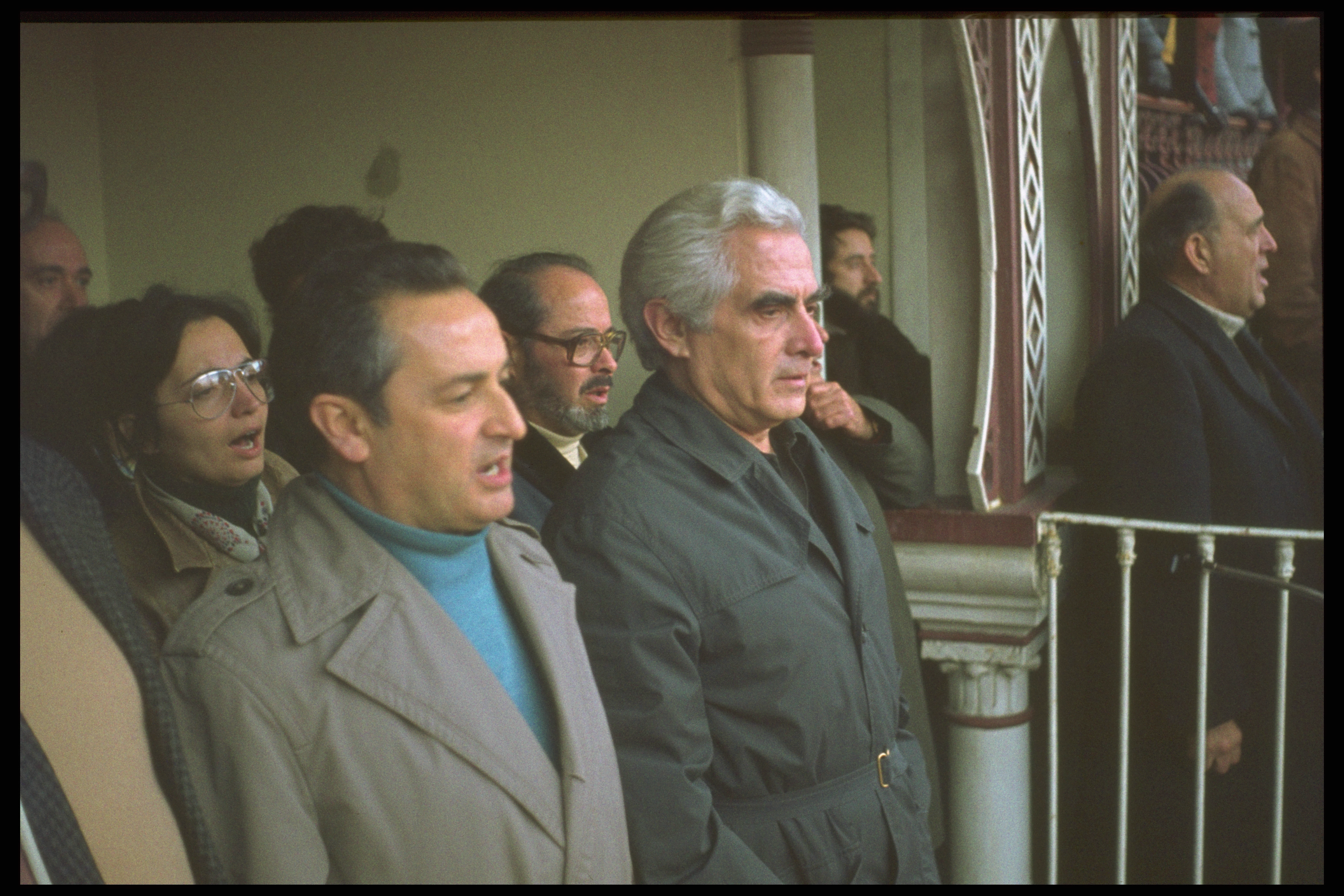 Álvaro Cunhal, secretário geral do Partido Comunista Português e Octávio Pato, candidato pelo PCP à Presidência da República Portuguesa, num comício, no Campo Pequeno, Lisboa